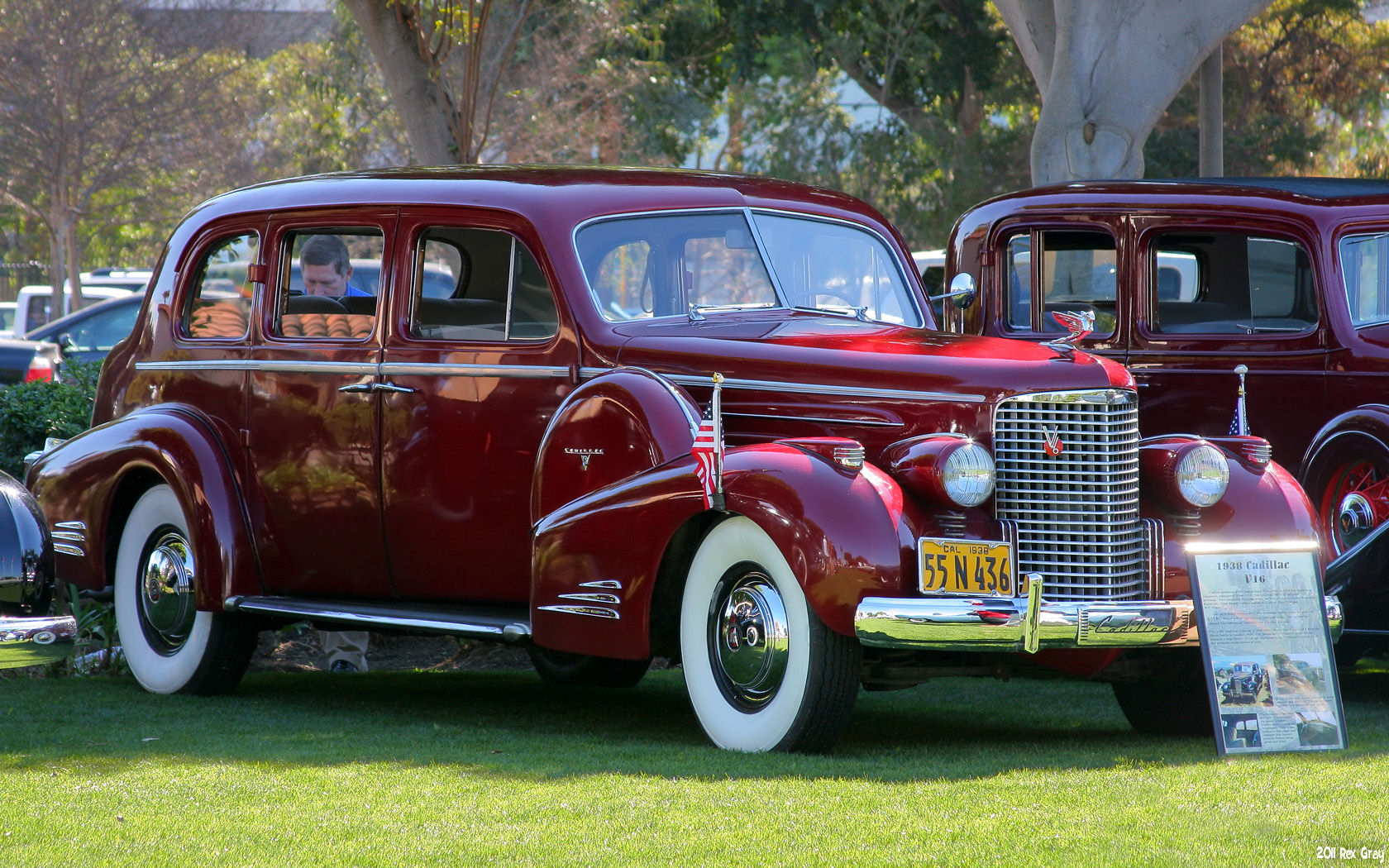 1938 Cadillac Series 90 V16 Limousine